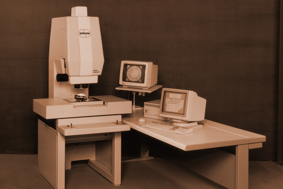 Multisensor-Koordinatenmessgerät mit Lasersensor und elektronischem, telezentrischen Zweistufen-Zoom